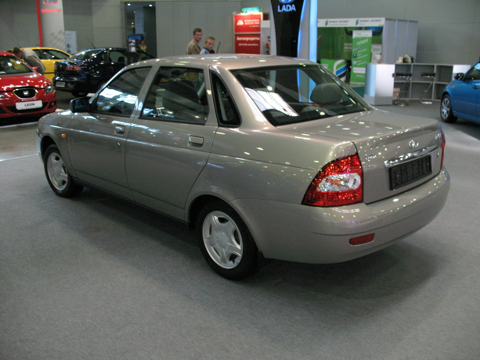 LADA Priora ВАЗ-2170 вид сзади